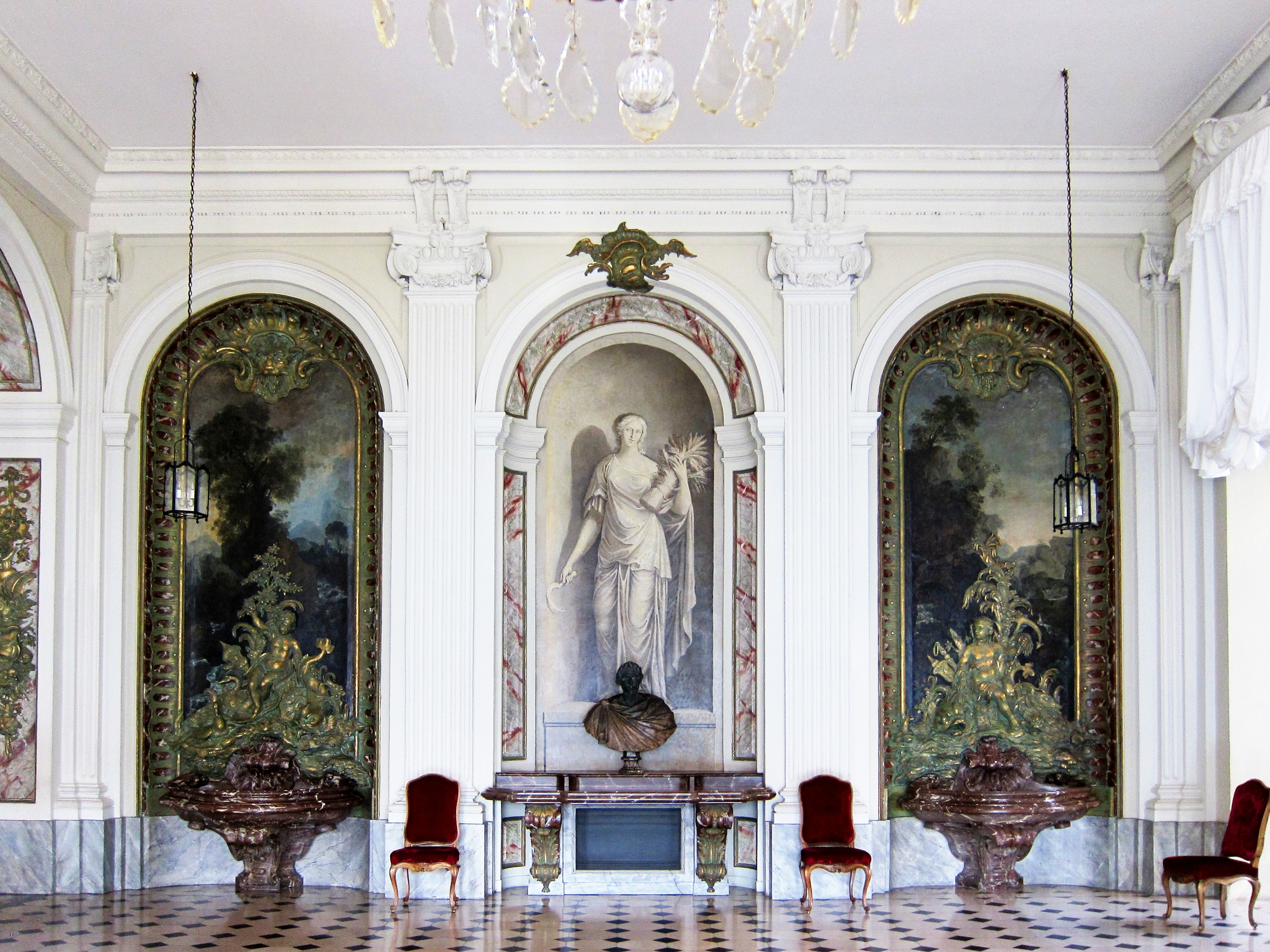 Décor de la salle du synode du Palais Rohan à Strasbourg.